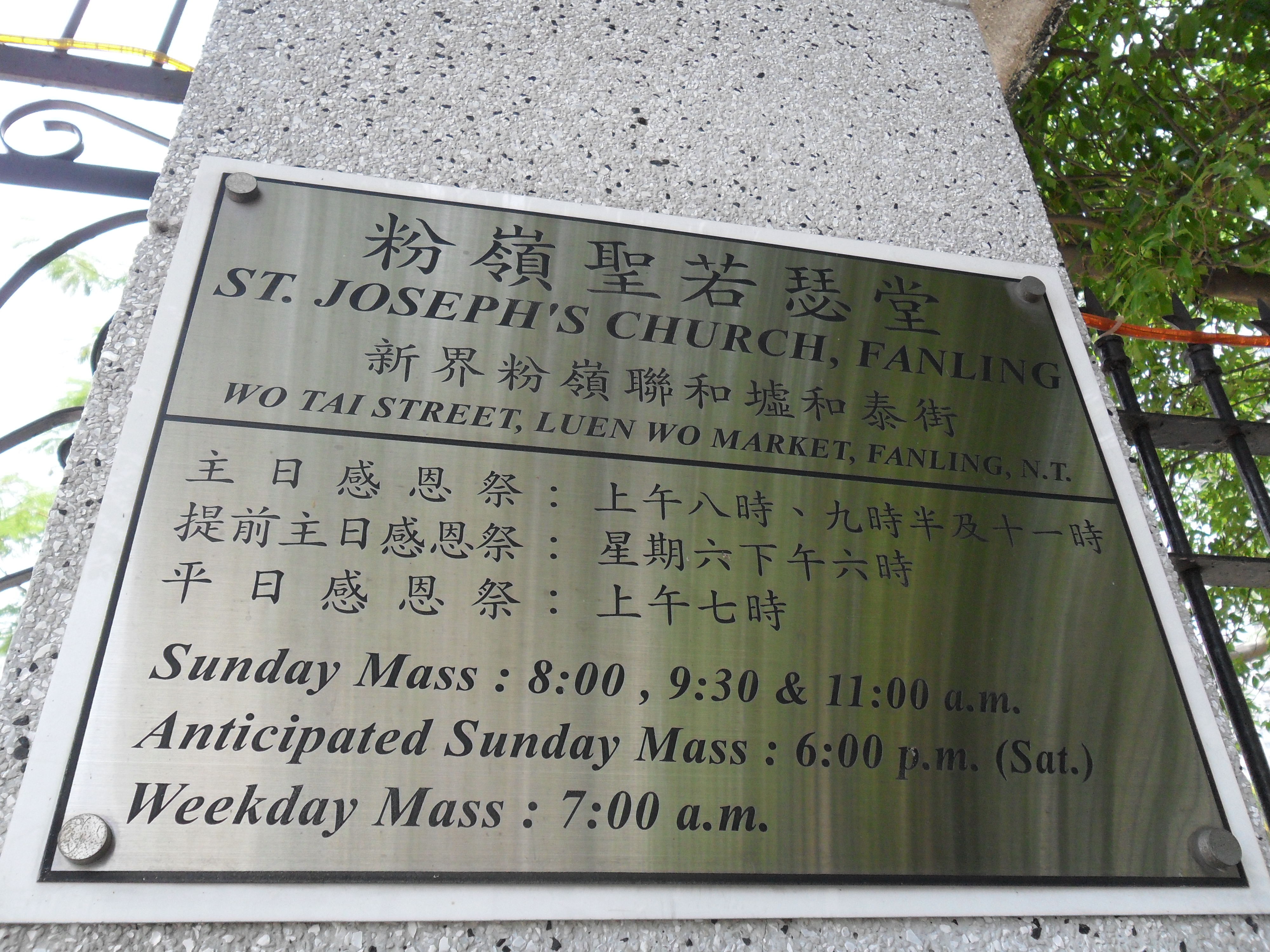 中文(香港): 粉嶺聖若瑟堂位置, , 香港, 中國